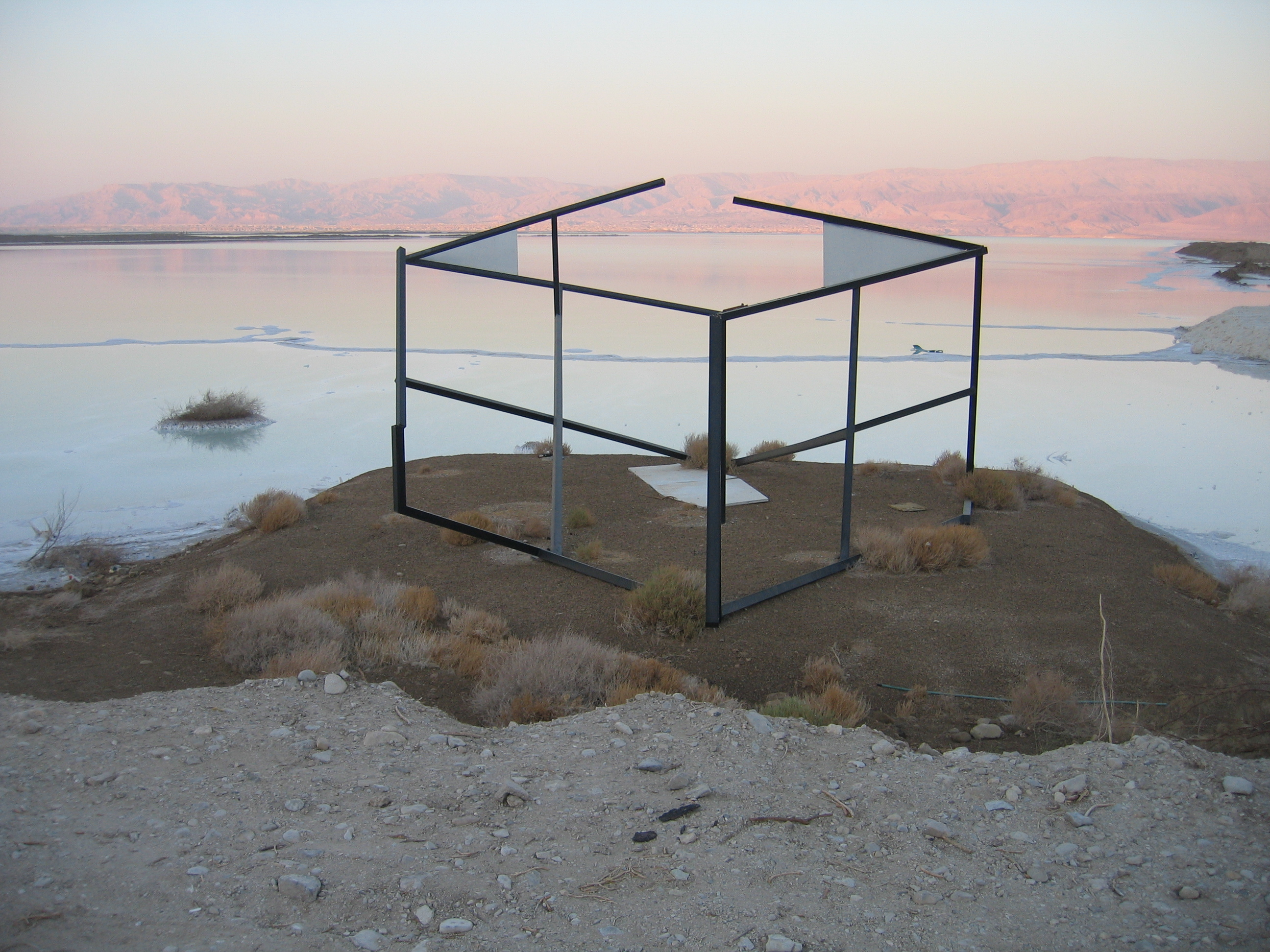 Sculpture